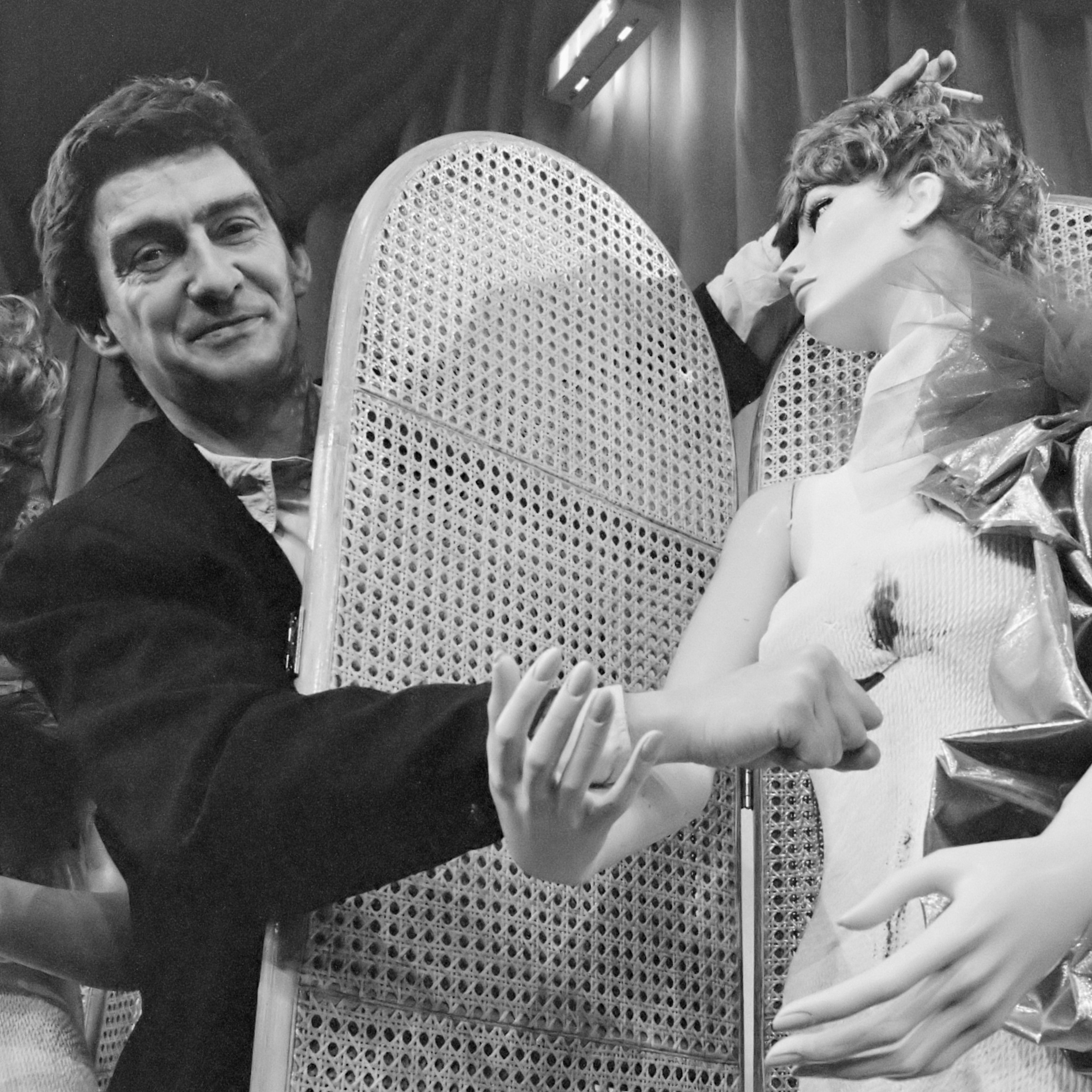 Misdaadauteur Tomas Ross "vermoordt" een etalagepop 18 april 1989